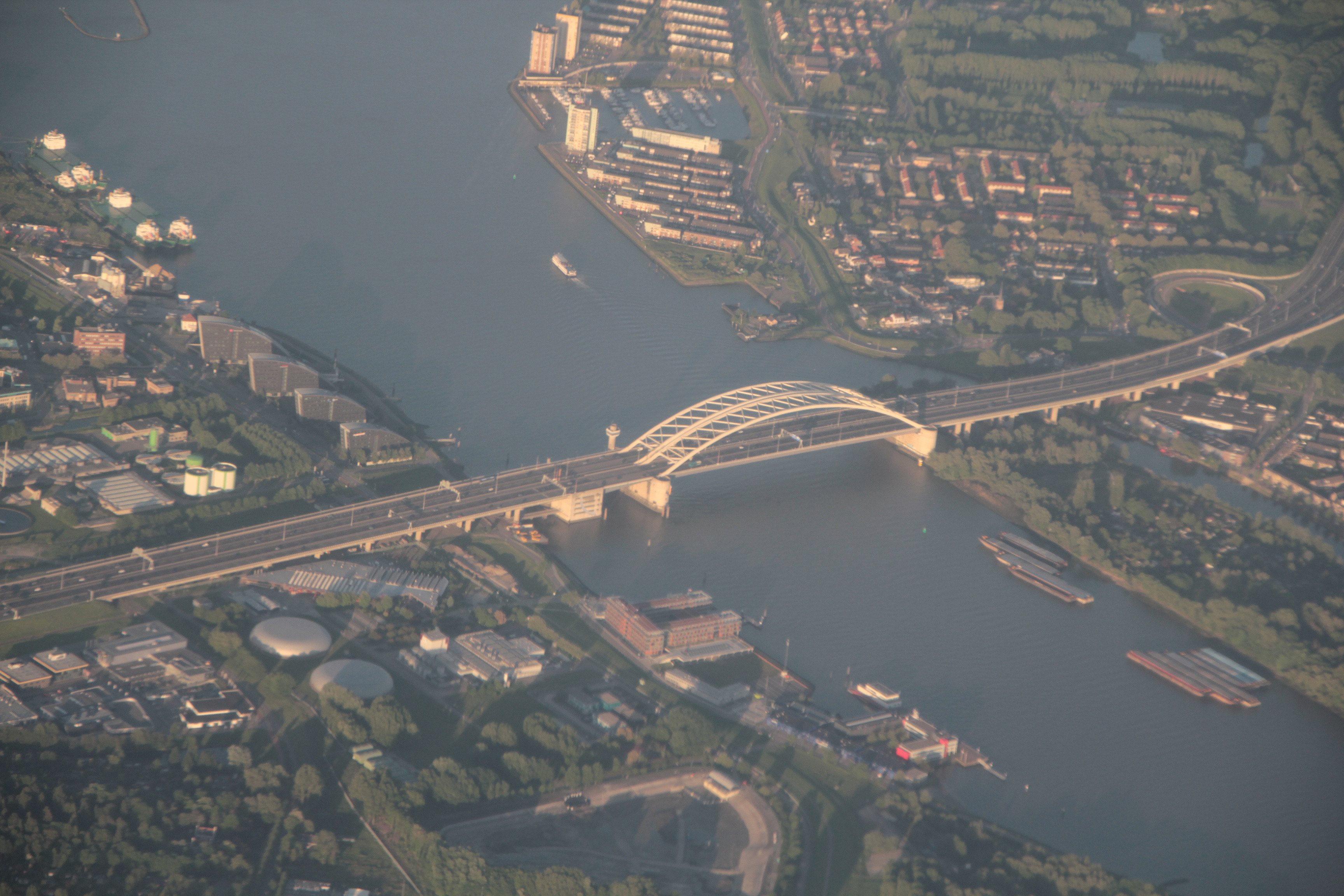 De Van Brienenoordbrug, gezien naar het Zuidoosten.